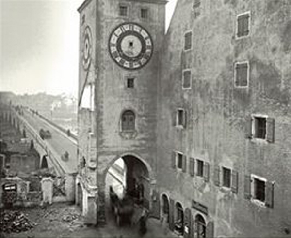 Regensburg im 19. Jhd - Bild vom Brückturm und der Steinernen Brücke vor dem Bau der Straßenbahn Der Übergang vom Amberger Stadel zum Brückturm, sowie die Verbreiterung für die Straßenbahn fehlen hier noch